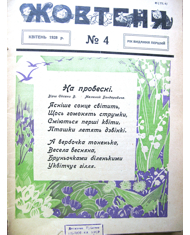 Журнал "Жовтеня" №4, 1928 рік